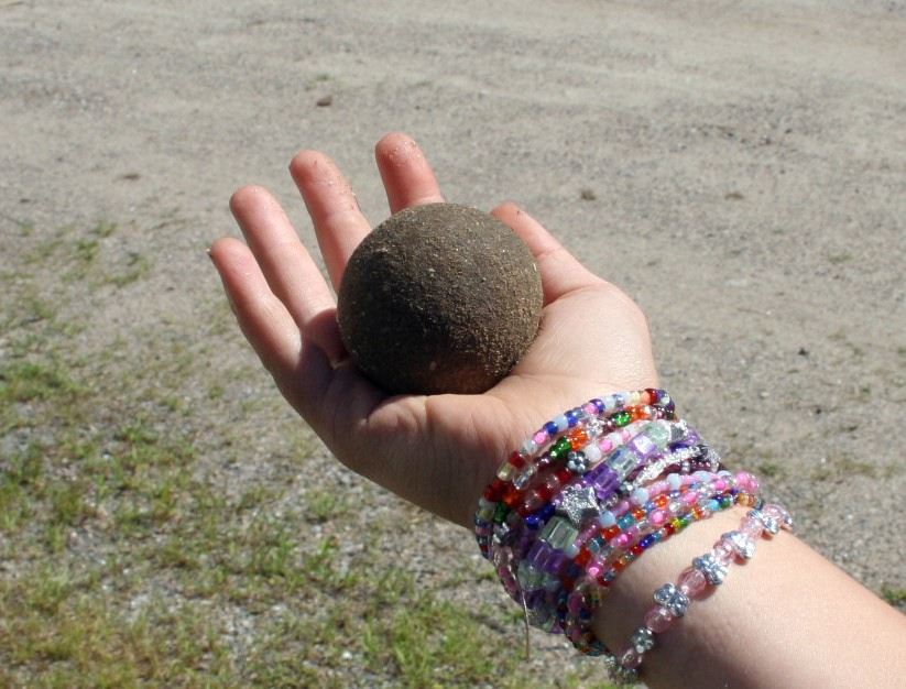 Dorodango Cropped to subject